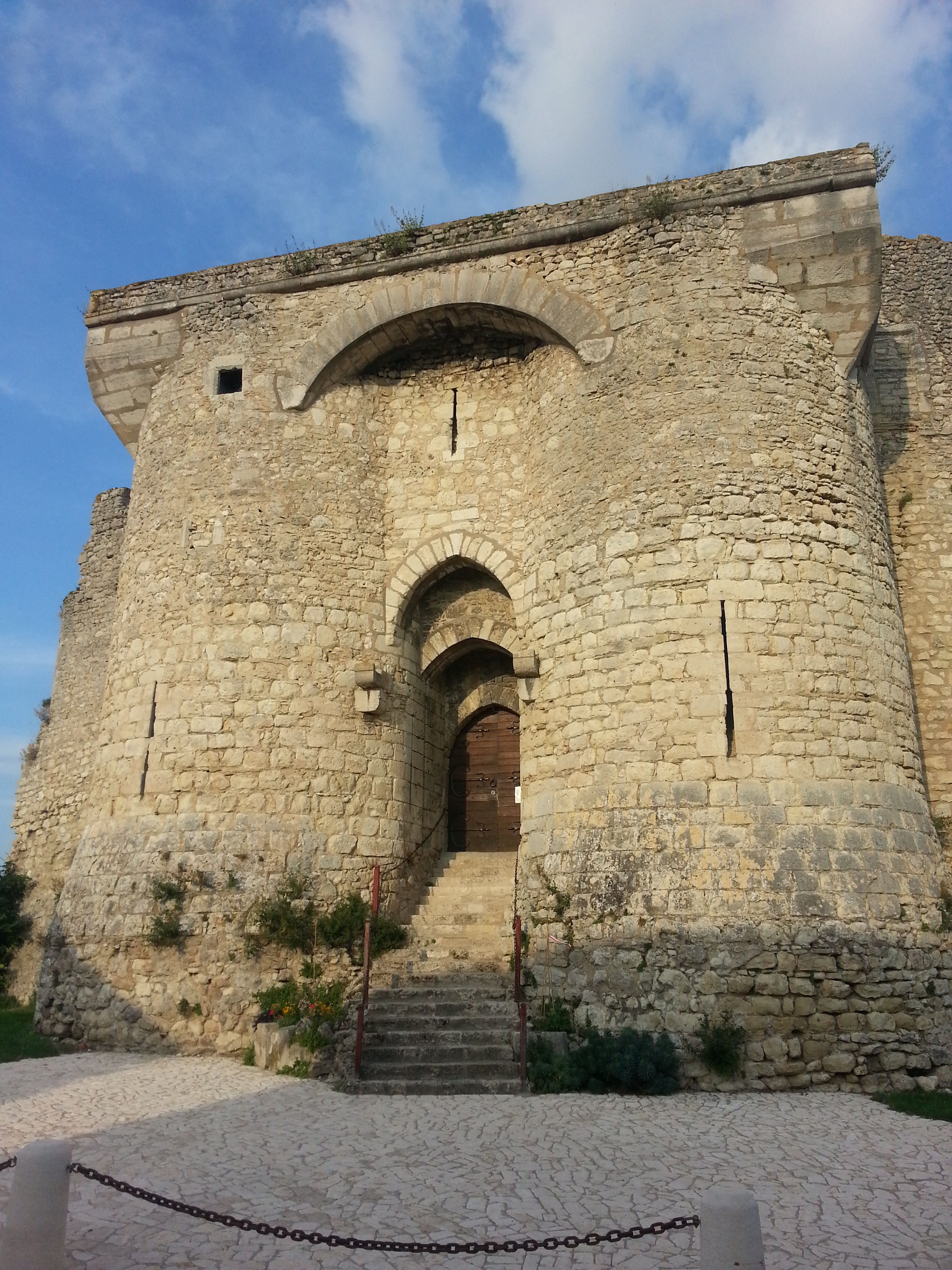 Château de Billy entrée